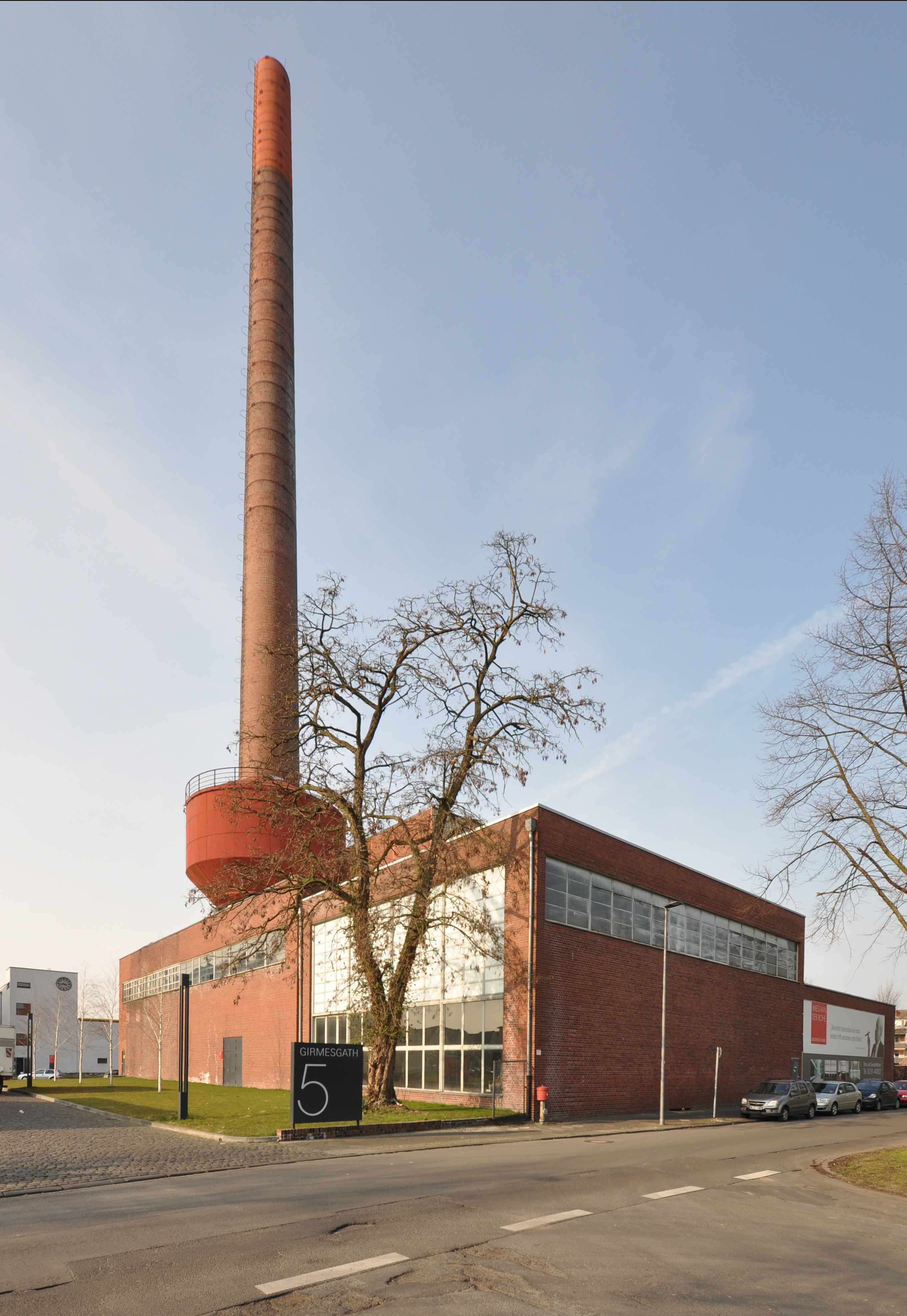 Ehemaliges Kesselhaus der VerseidAG, heute der Mies van der Rohe Business Park